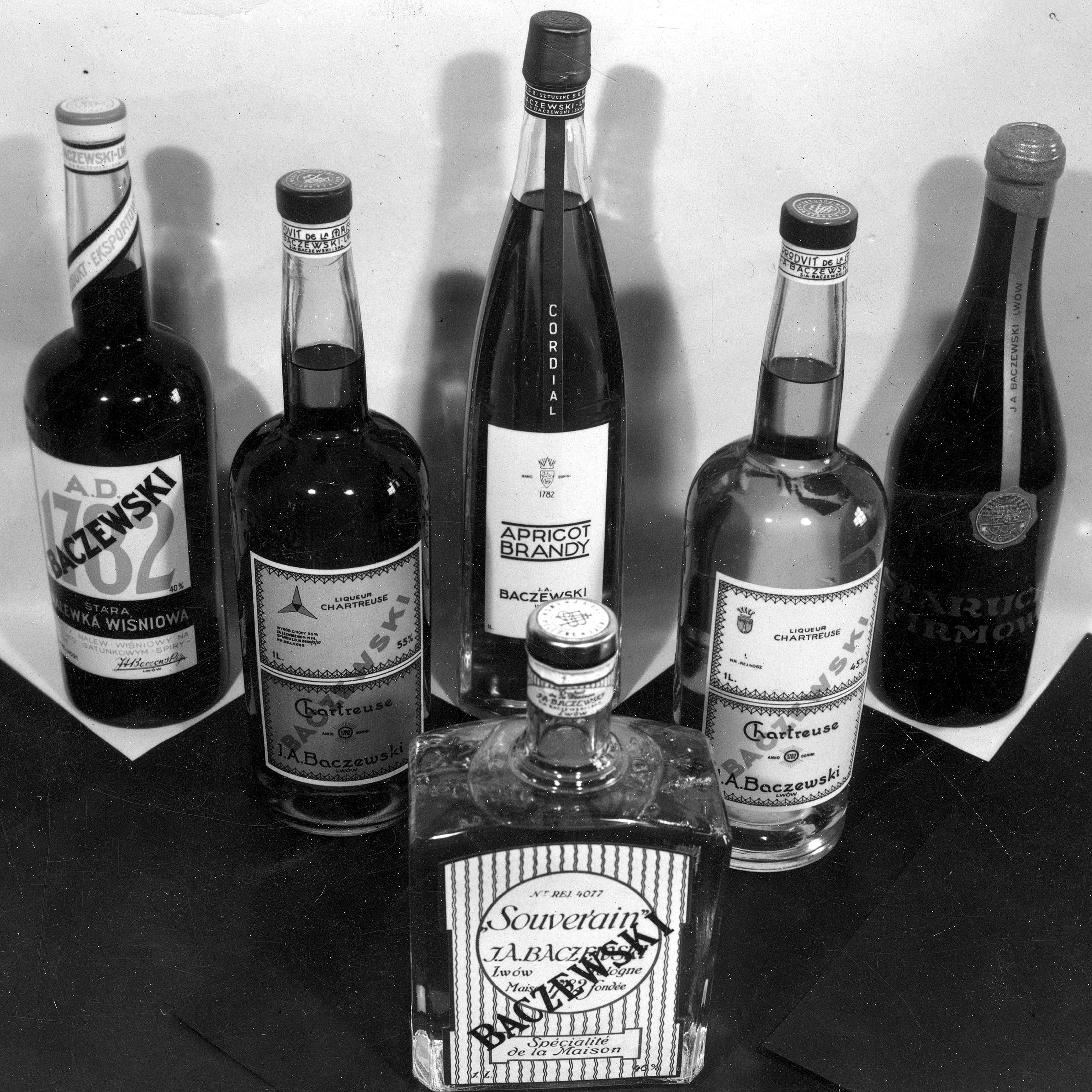 Wyroby z fabryki wódki, likieru i rumu J.A. Baczewski we Lwowie